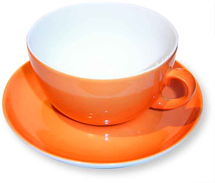 Tasse mit Untertasse Hinweis vom Urheber des Bildes: Dieses Bild wurde von mir selbst erstellt und im Sinne der GFDL freigegeben (This Image is licensed to the public under the GNU Free Documentation License). Die Verwendung dieses Bildes ist somit inner- und außerhalb von Wikipedia FREI und ausdrücklich erwünscht. -- Horst Frank 20:25, 15. Dez 2003 (CET)